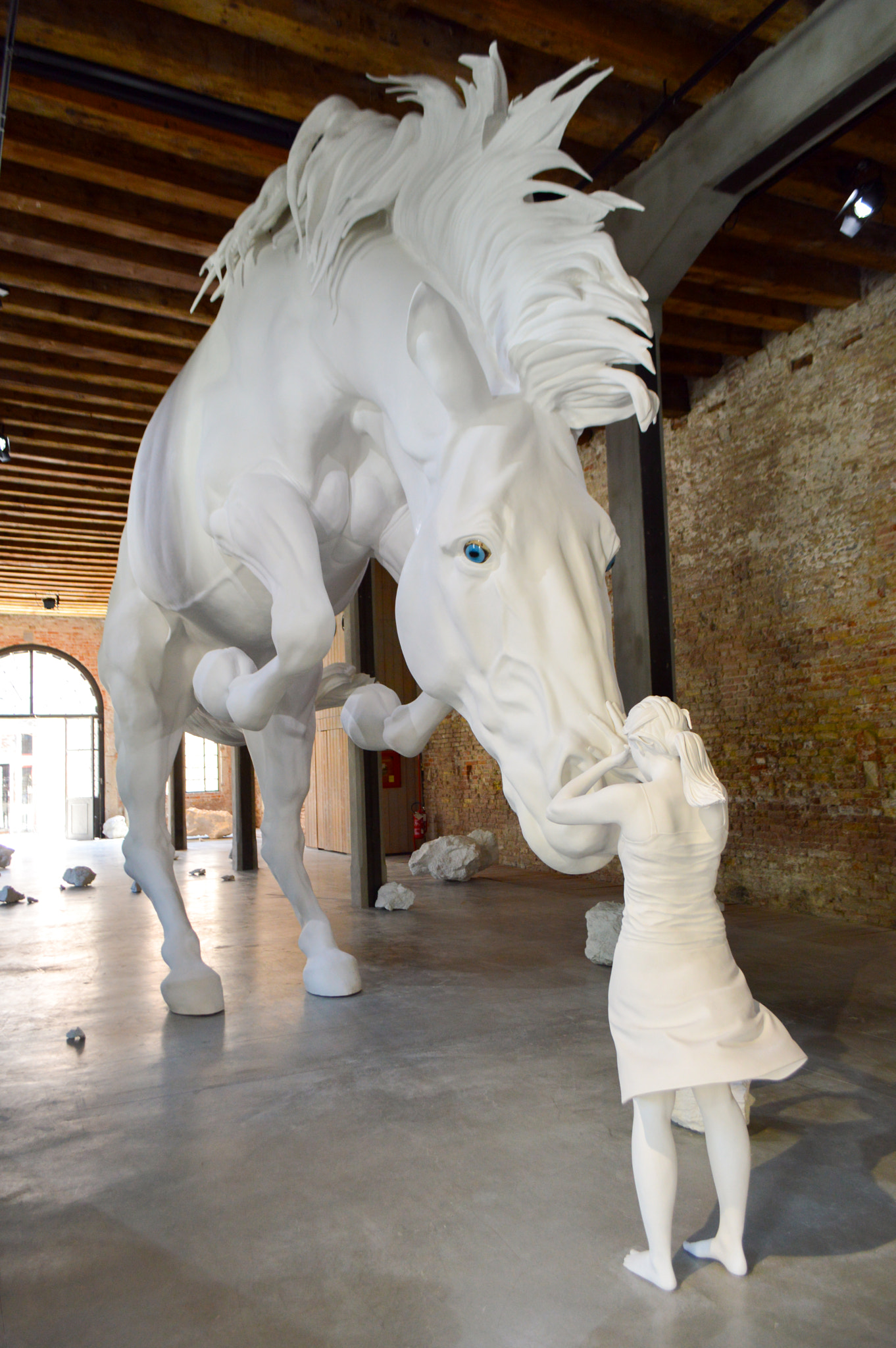 500px provided description: Claudia Fontes Argentina [#art ,#biennial ,#bienale ,#Italy ,#Italia ,#Europe ,#Venice ,#Venezia]